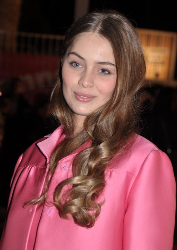 Marie-Ange Casta aux NRJ Music Awards